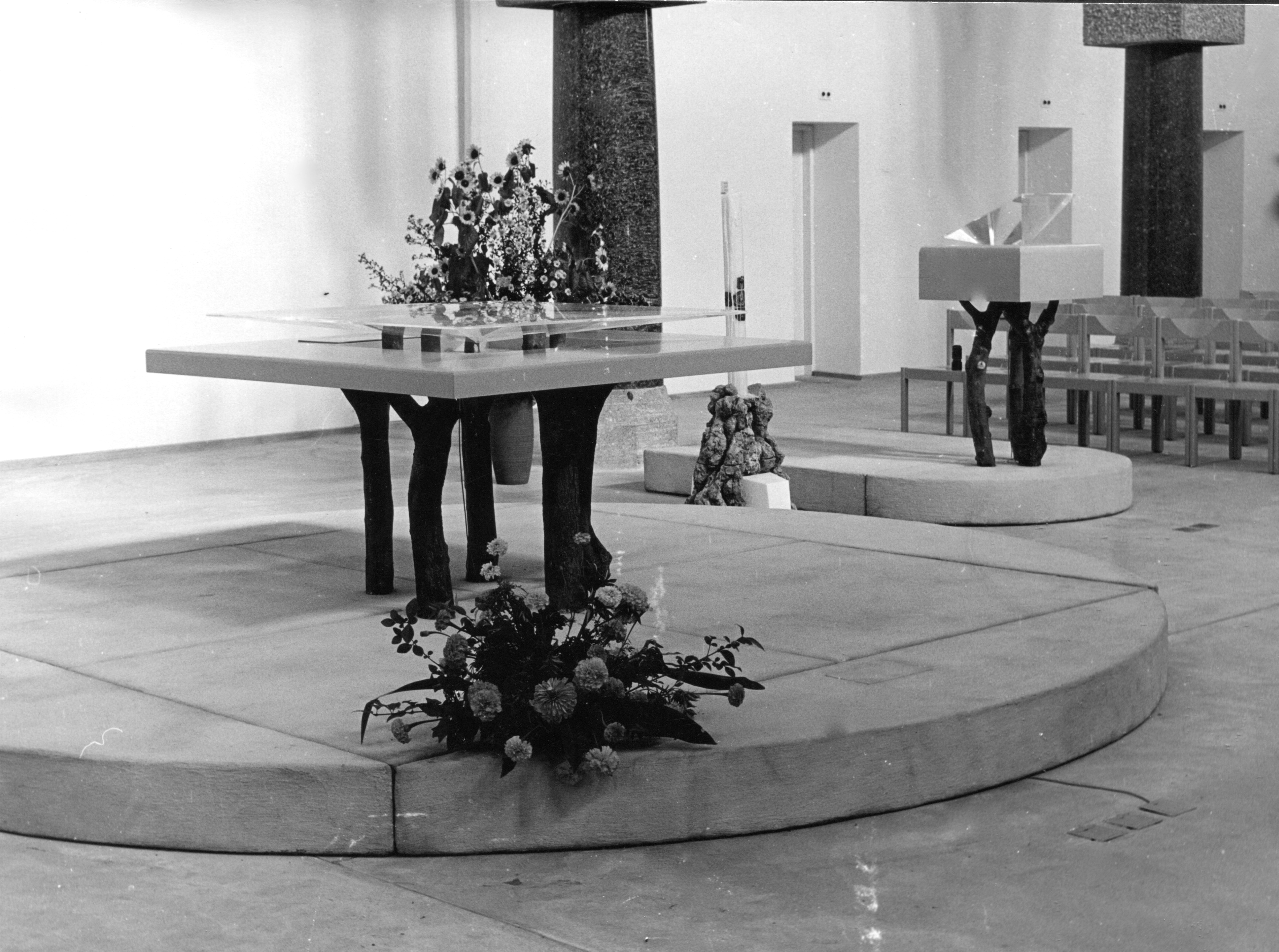 Altarbereich der römisch-katholischen Pfarrkirche St. Franziskus Zürich-Wollishofen von 1973-2004